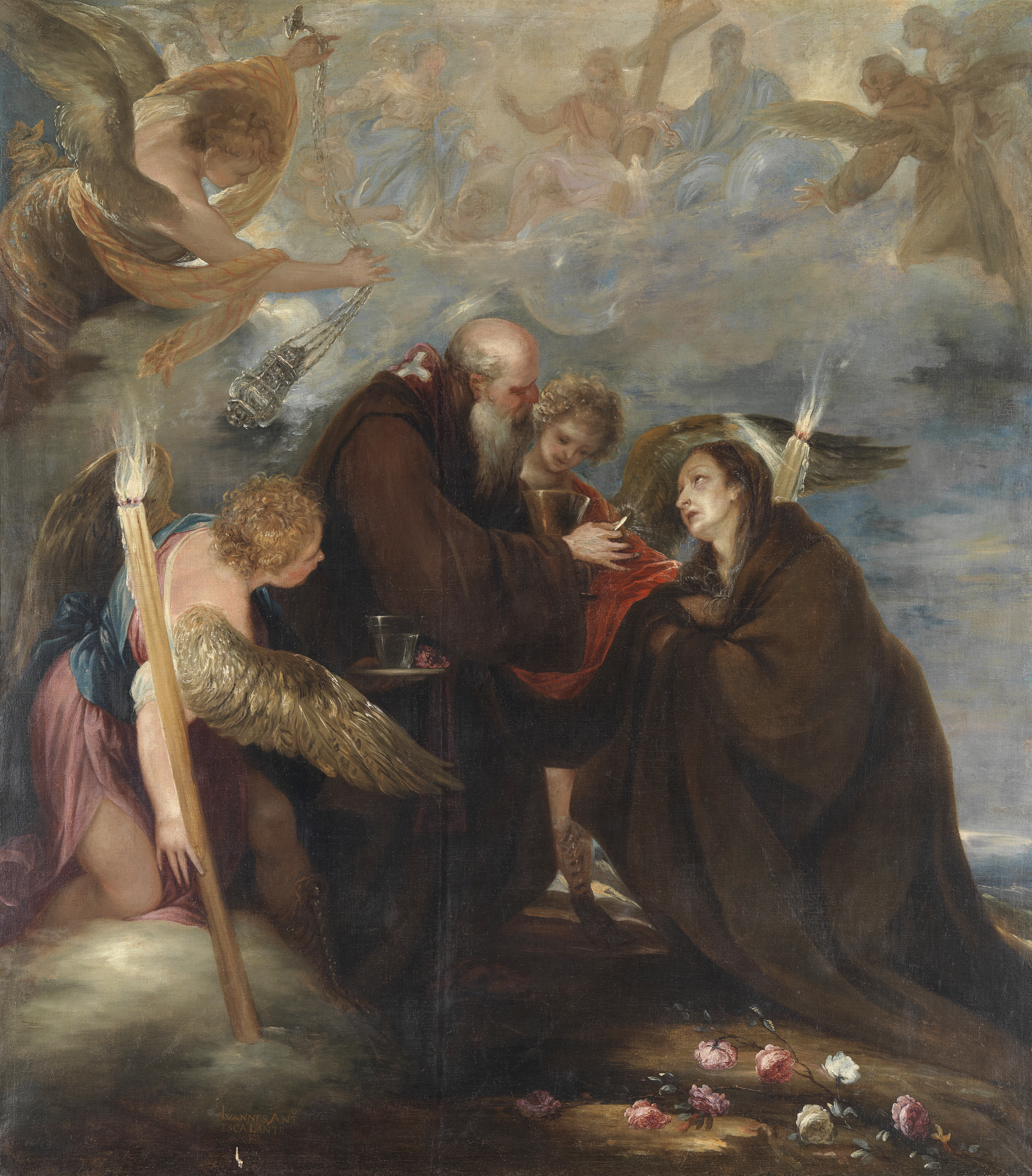 La obra representa a la religiosa franciscana Santa Rosa de Viterbo (1234-1252).